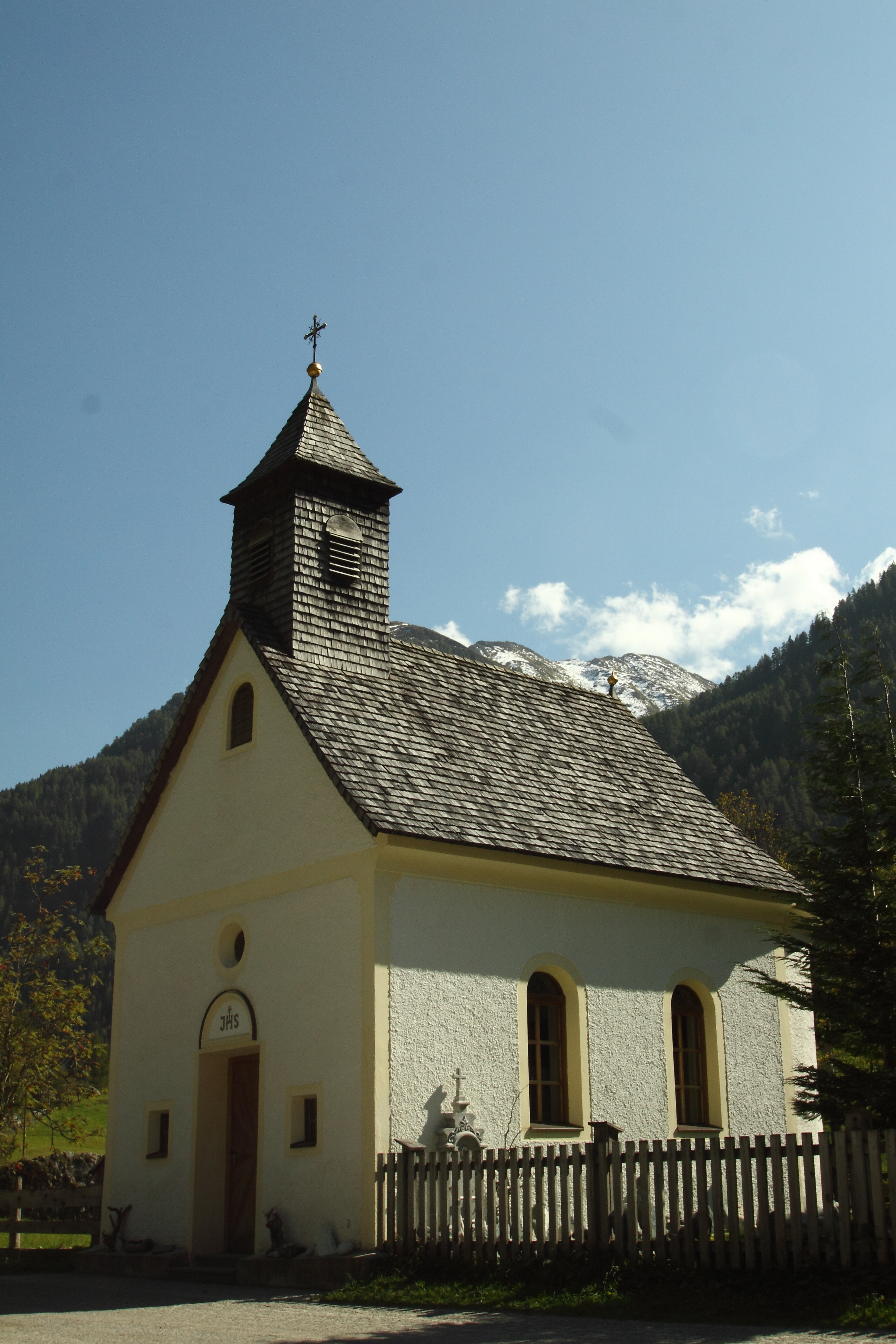 Aussenansicht der Herz Jesu Kapelle in Ströden (Bezirk Lienz)